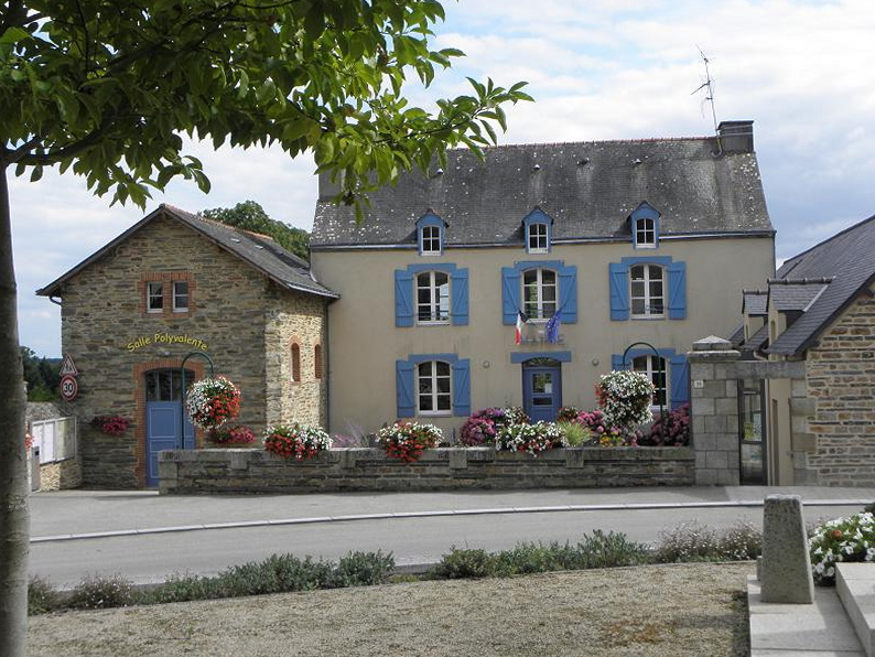 Mairie de Renac (35).